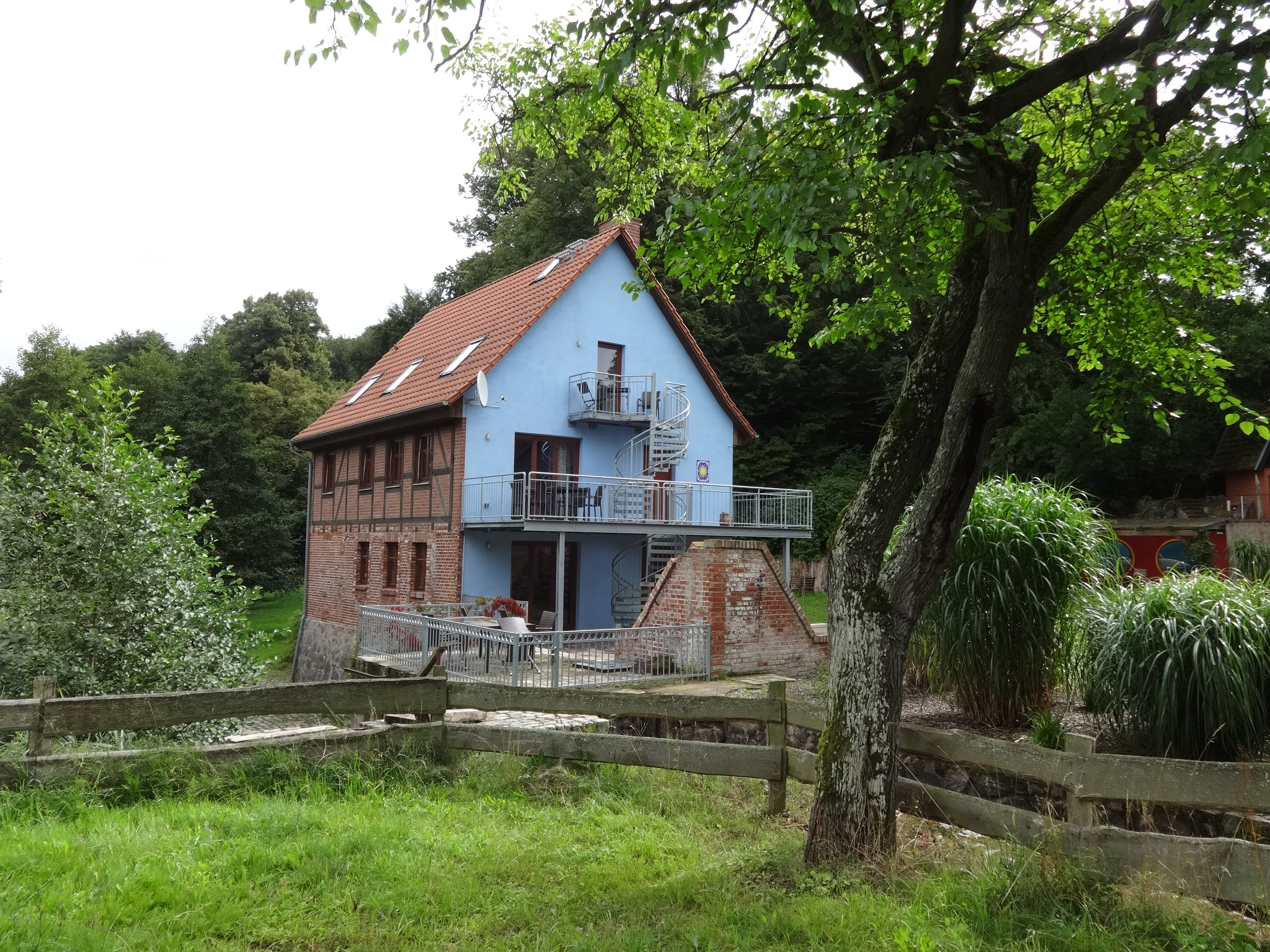 Alte Wassermühle in Hohendorf, ein Ortsteil von Wolgast in Vorpommern-Greifswald